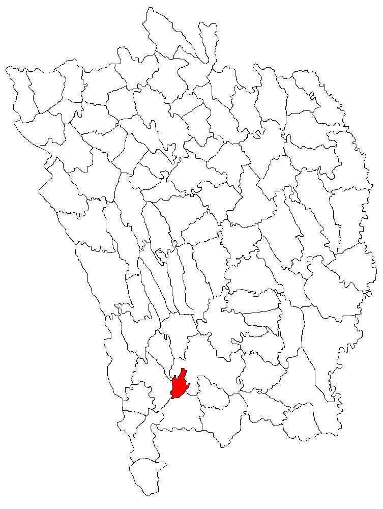 Categorie:Hărţi ale judeţului Vaslui